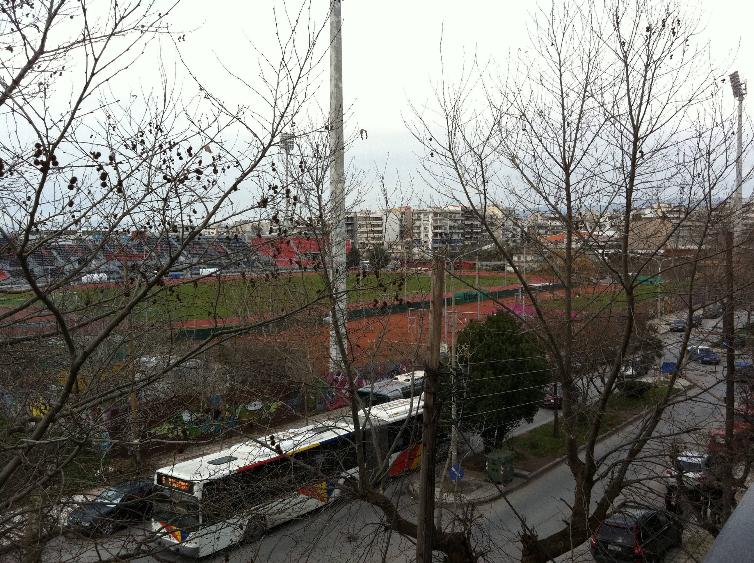 Apollon Kalamarias' Stadium, Hilis str.